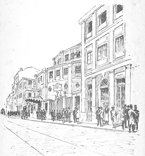 Dibujo de la fachada del Teatro del Príncipe Alfonso (o Teatro Circo de Rivas), Madrid, España.